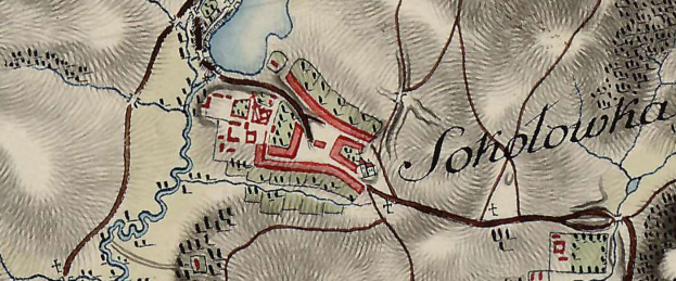 xviii map